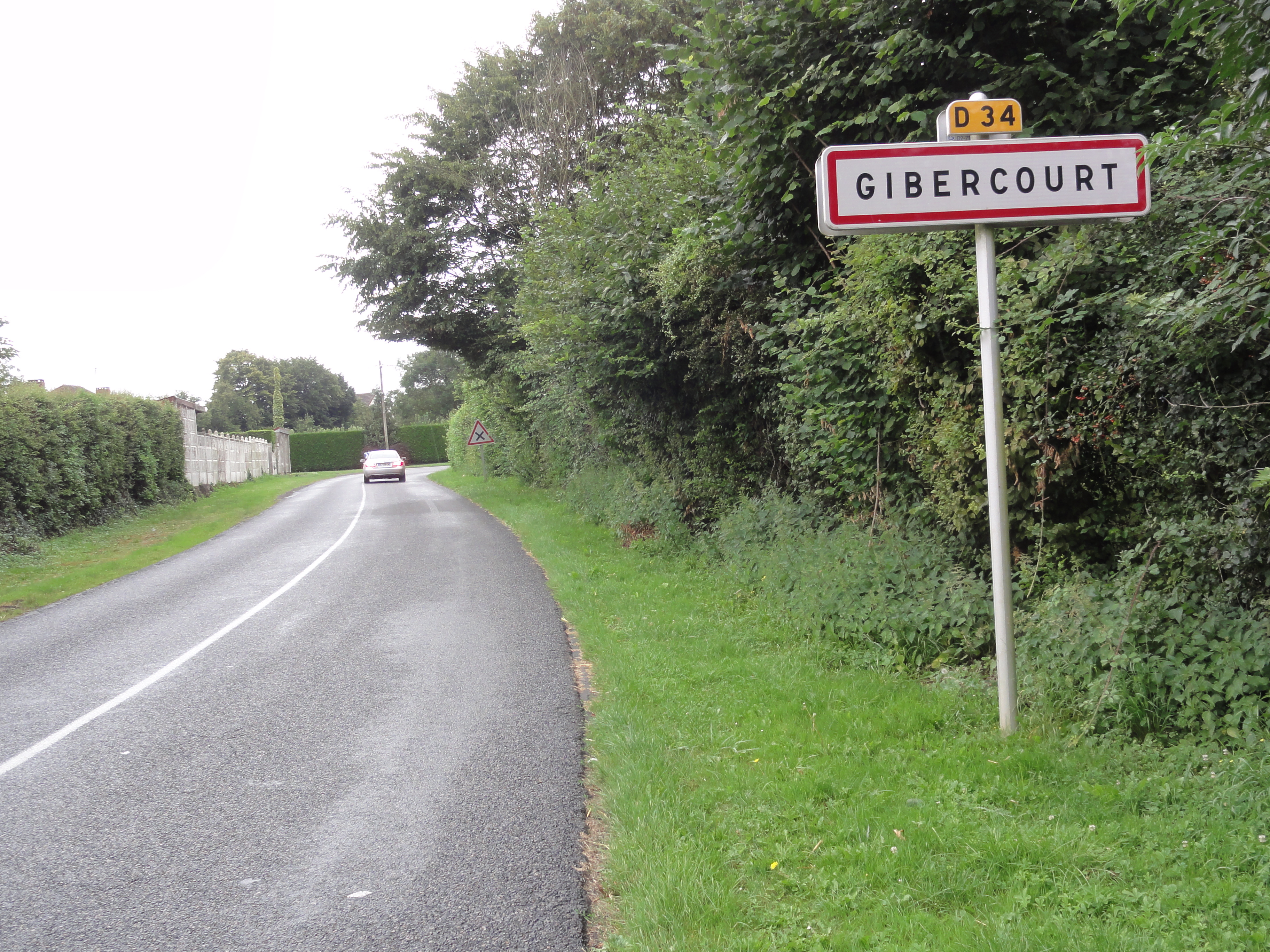 Gibercourt (Aisne) city limit sign